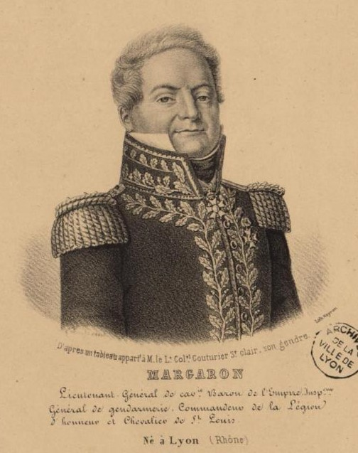 Le général de division Pierre Margaron (1765-1824).